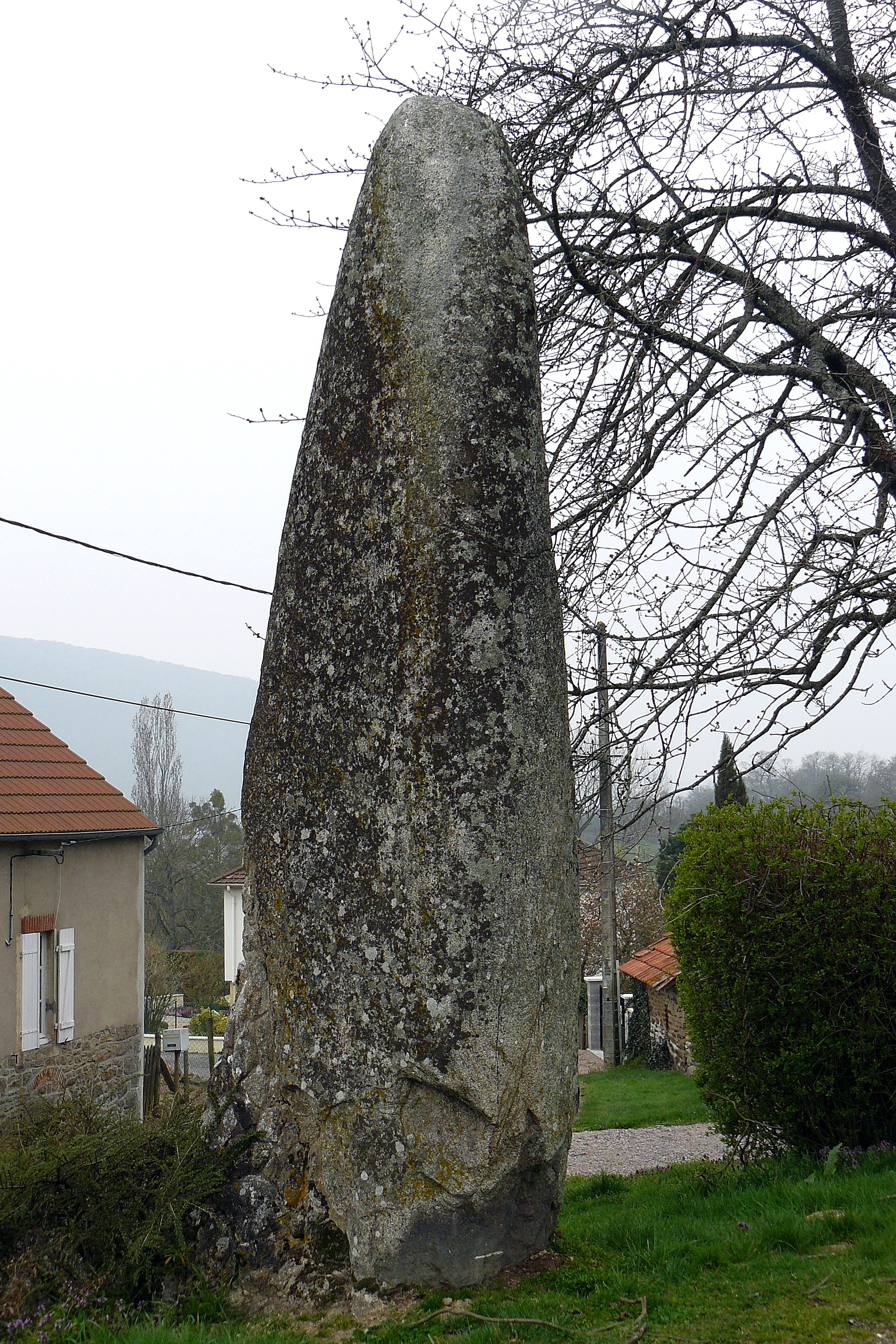 Le menhir de Charmeau (Broyes, Saône-et-Loire, France)